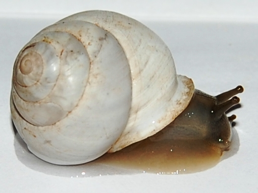 Marmorana sicana Fèrussac, 1822 Monte Pellegrino, Palermo